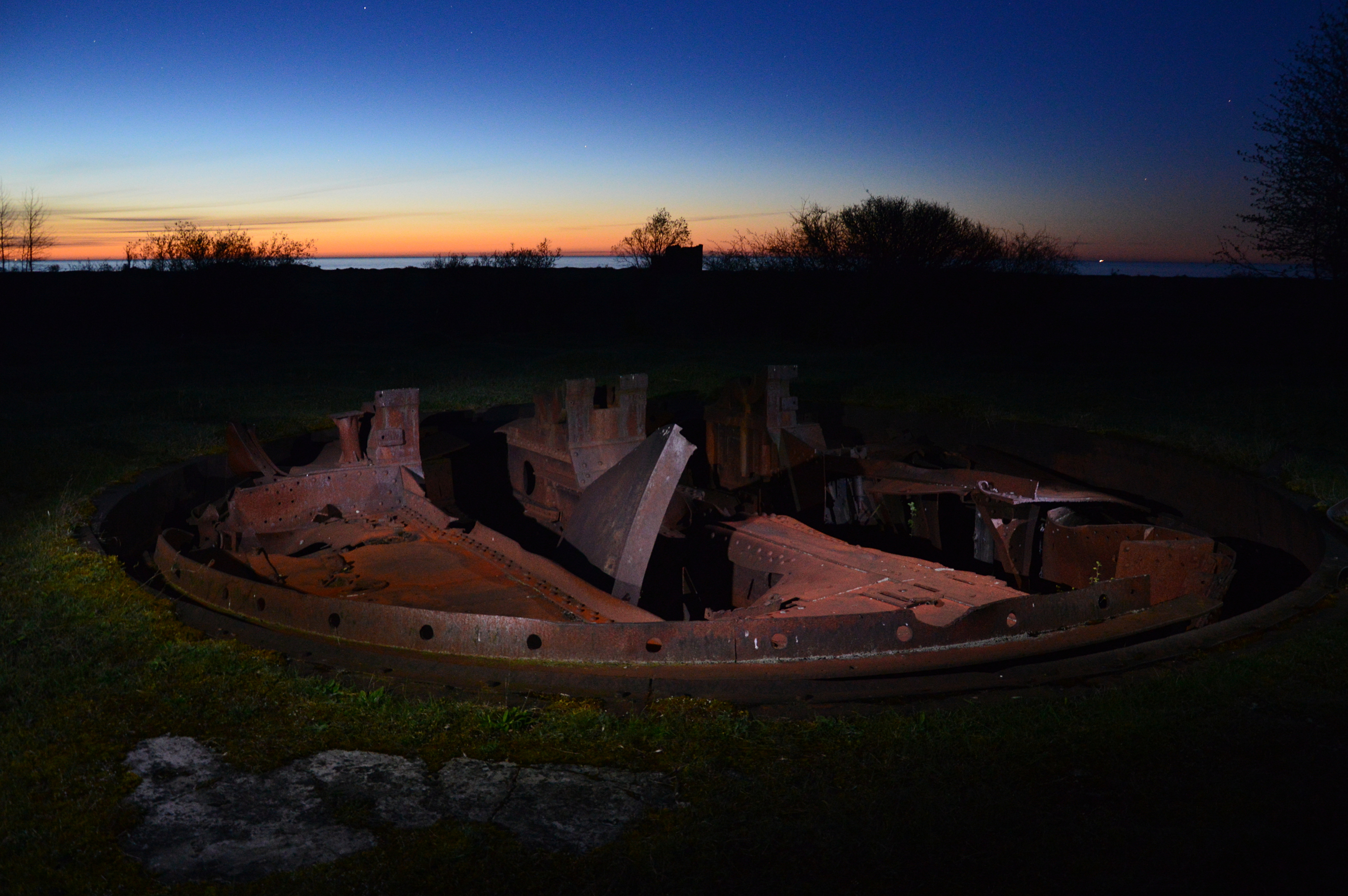 Osmussaare kauglaskekahur.